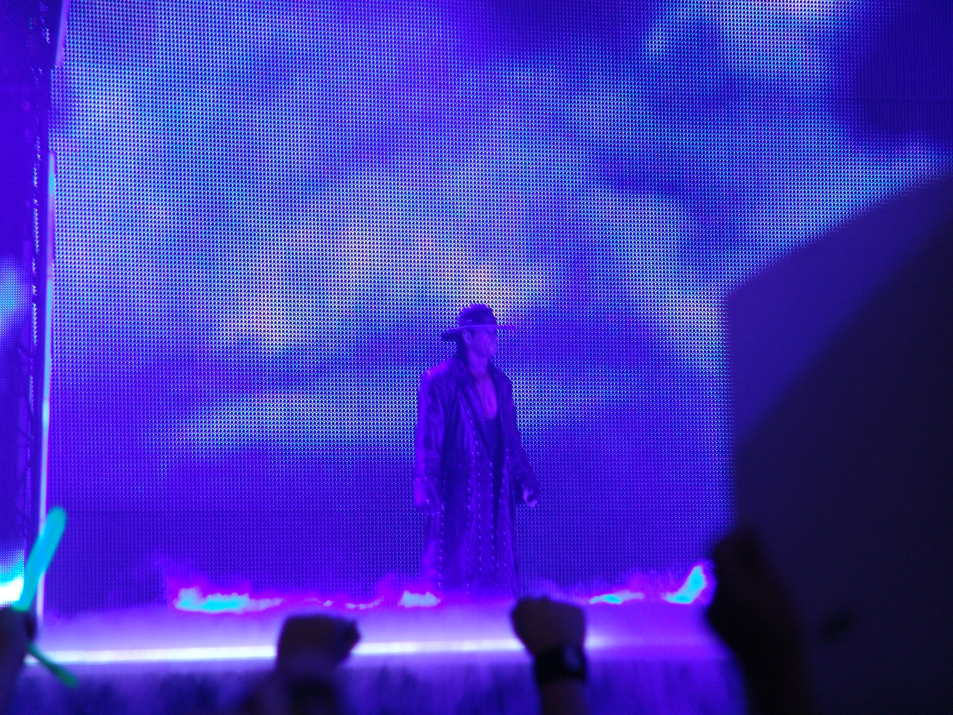 Taker entrando en WM 27